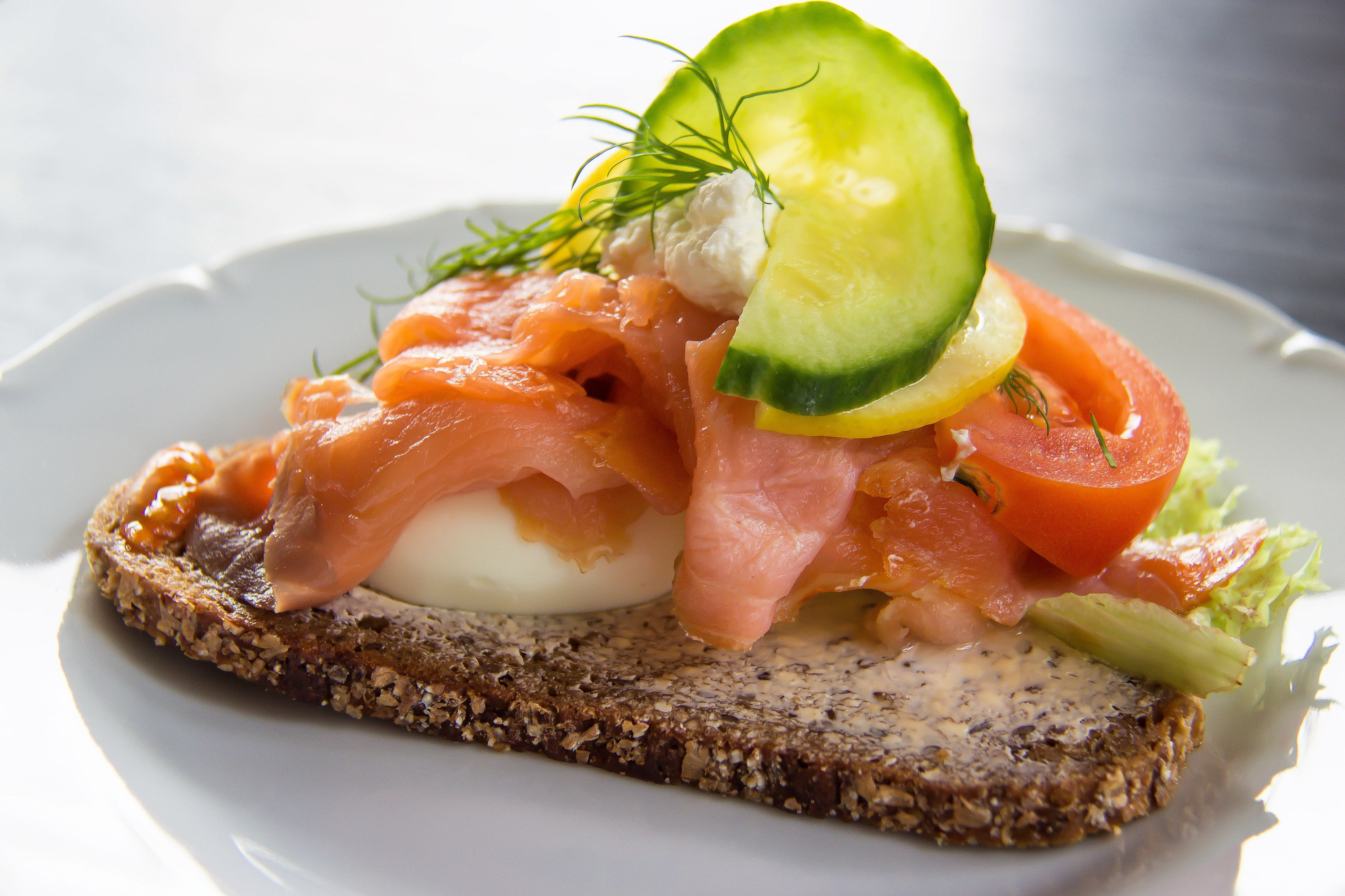 Smörgås mit Lachs und Ei, sowie mit Gurke, Zitrone, Tomate und Blattsalat.